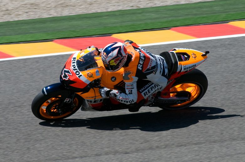 Mugello 2009 - Saturday, May 30 Andrea Dovizioso, Honda RC212V Qualifying: 7